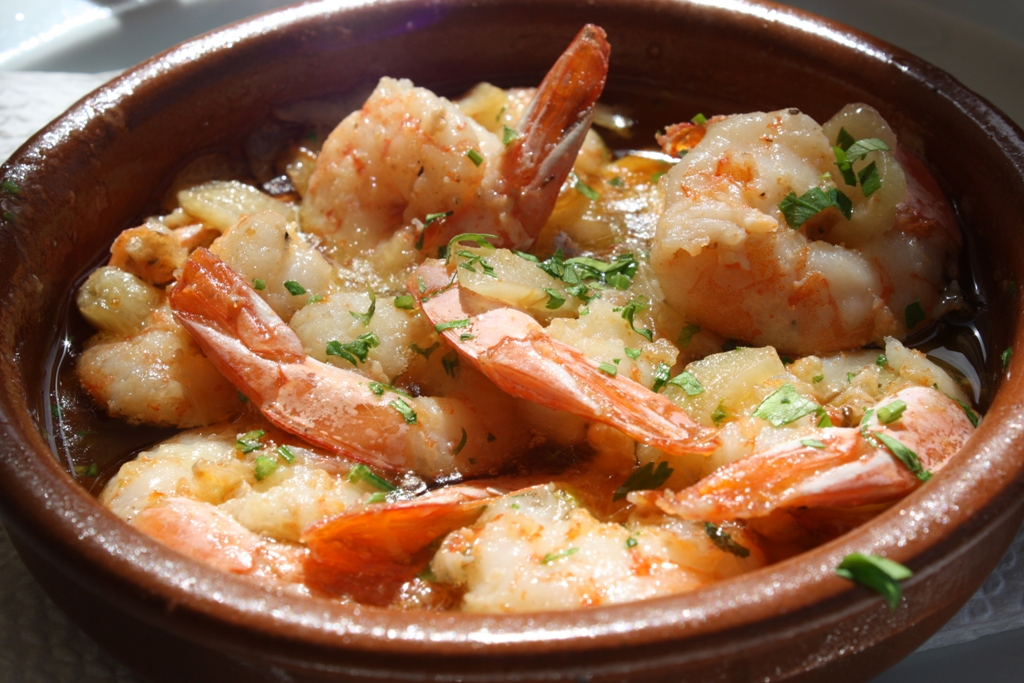 Gambas al ajillo, plato típico de la gastronomía española. Elaborado en el Restaurante La Vieja, en Adeje, Canarias. Ver artículo en el blog ellaboratoriogastronomico See post in My blog at Link